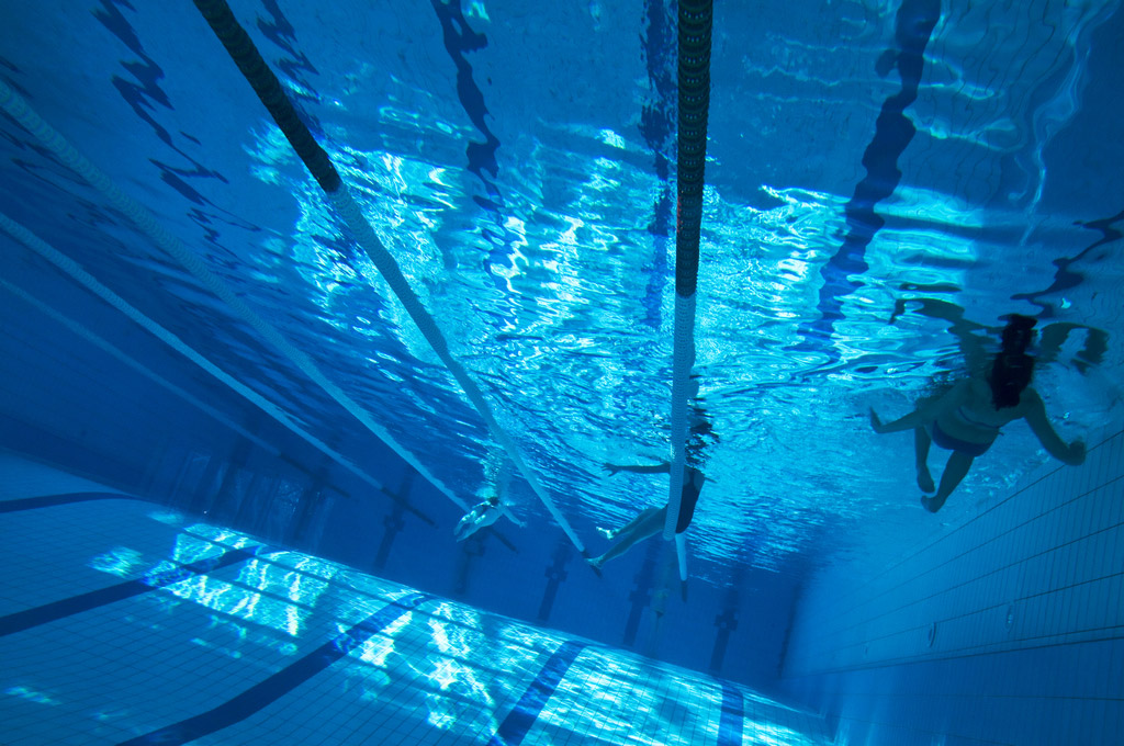 Basen w centrum sportu, al. Zwycięstwa 12.